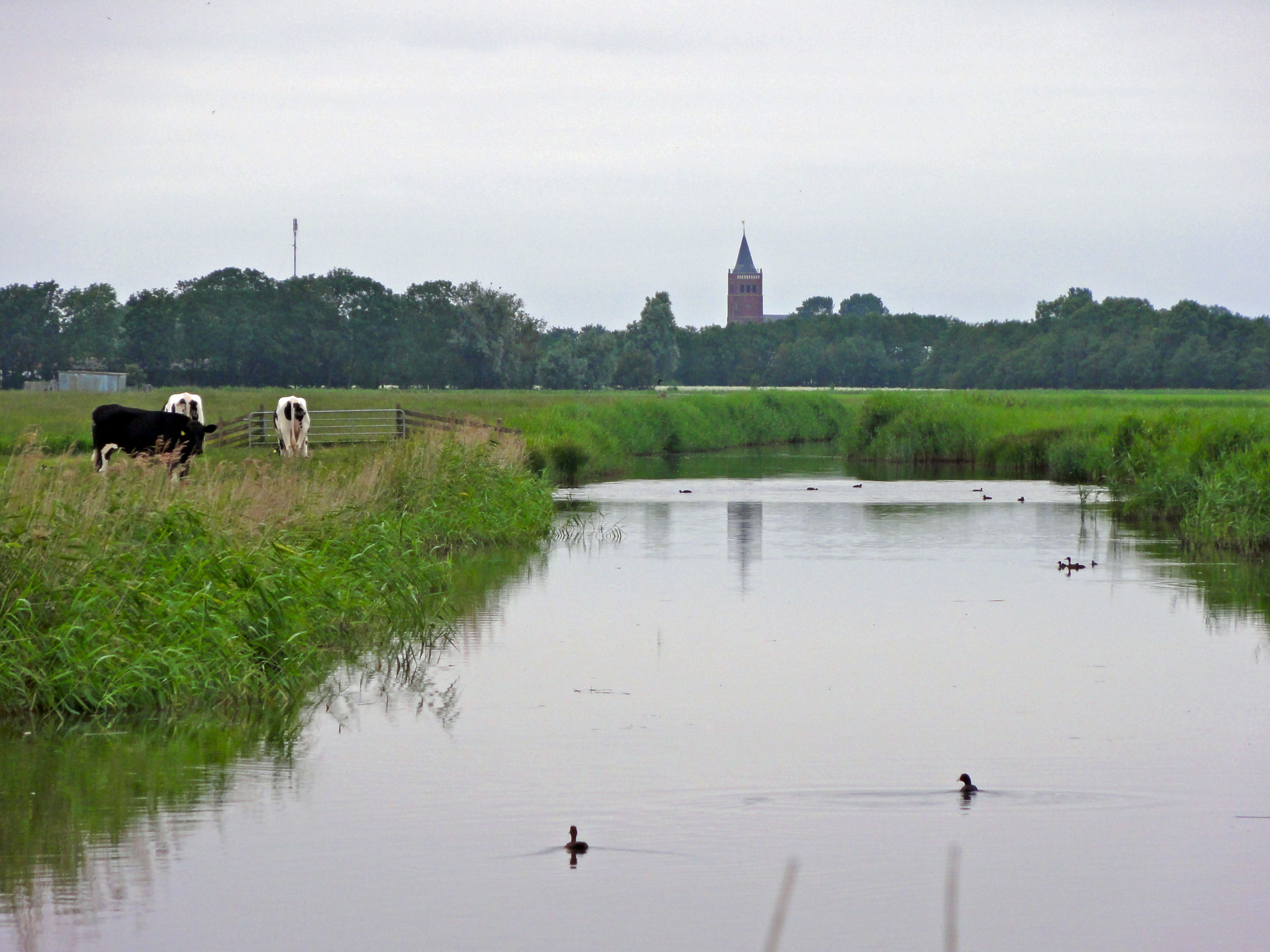 Opvaart (Seisbierrumer Opfeart) gezien vanaf de Sexbierumervaart in de richting van Sexbierum